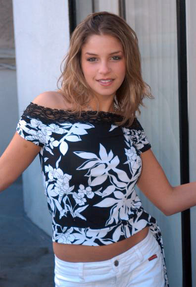 Autumn Bliss